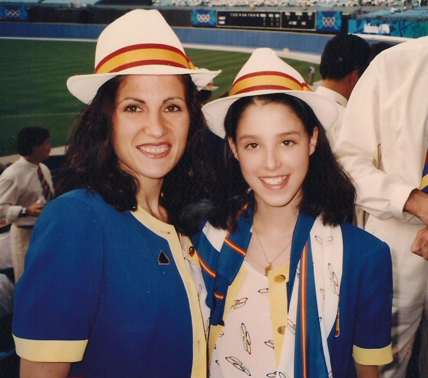 Marisa Mateo y Tania Lamarca el día del desfile inaugural en los Juegos Olímpicos de Atlanta 1996.